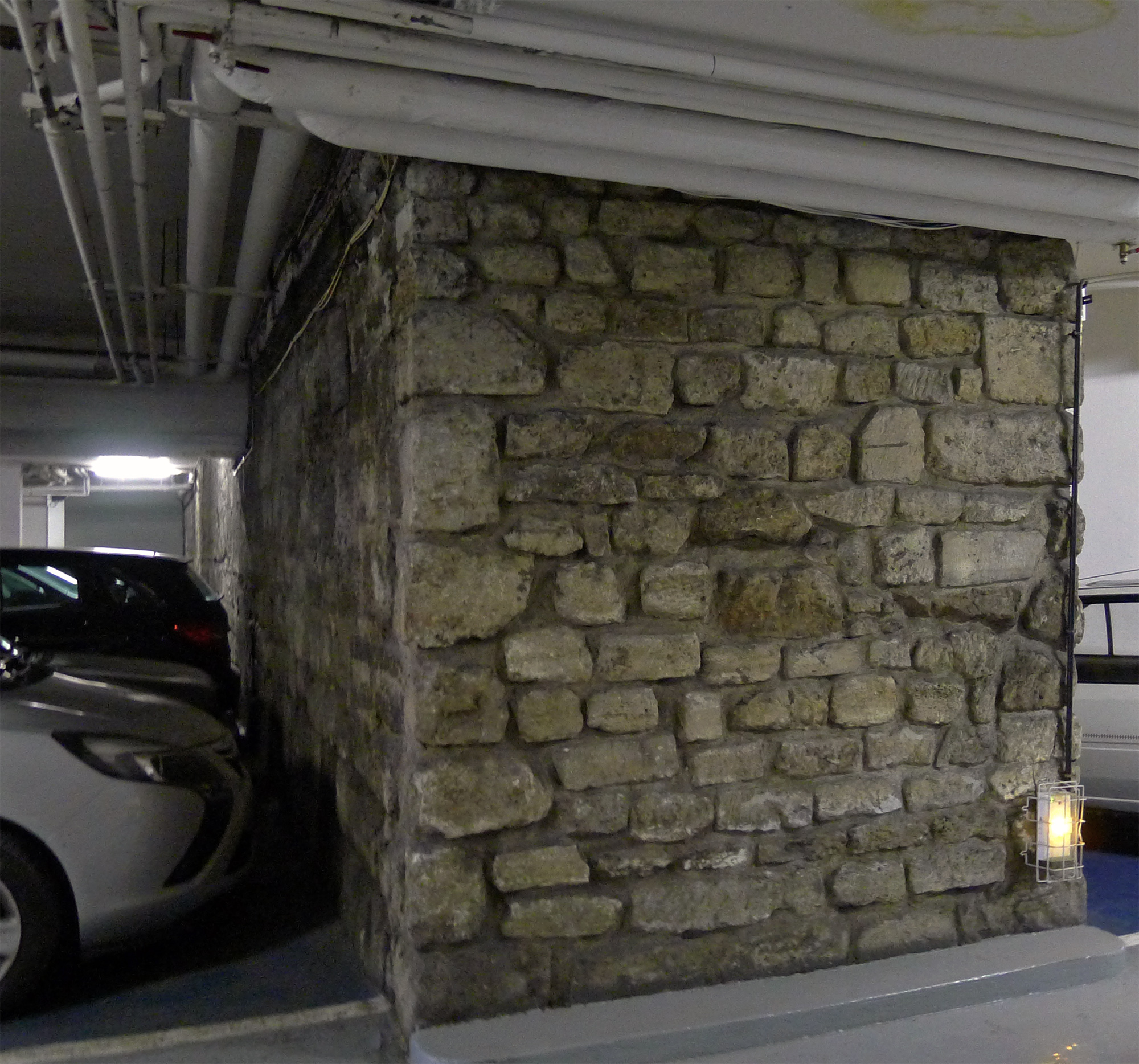 Enceinte de Philippe Auguste (Classé) - n°35 rue Mazarine - Paris VI .